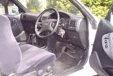 Nissan NX interior